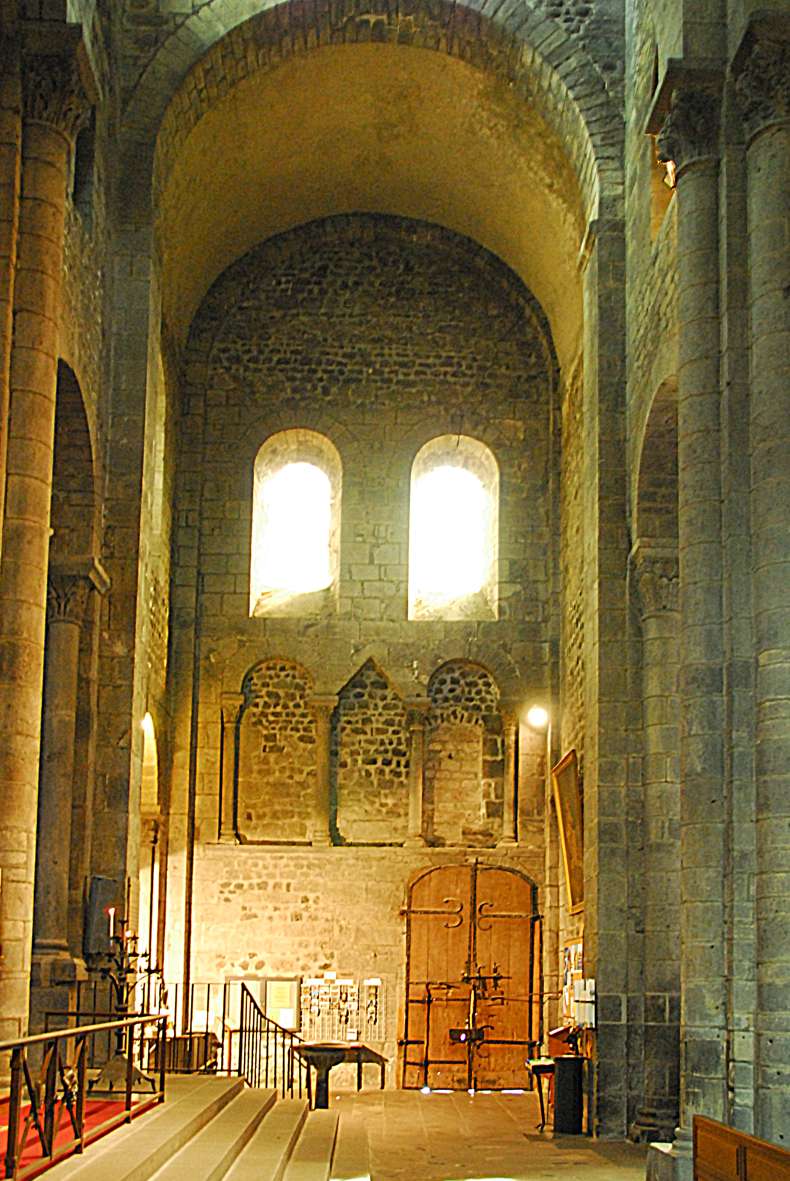 N.-D. d'Orcival,Südl. Querhausarm